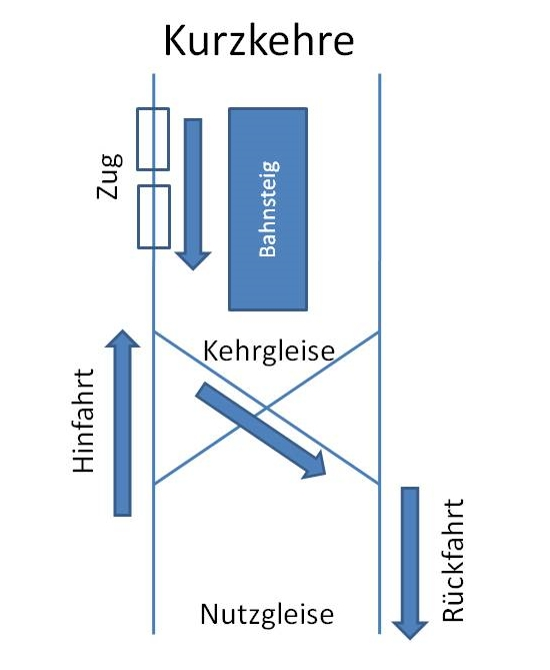 Kurzkehre im Bahnverkehr